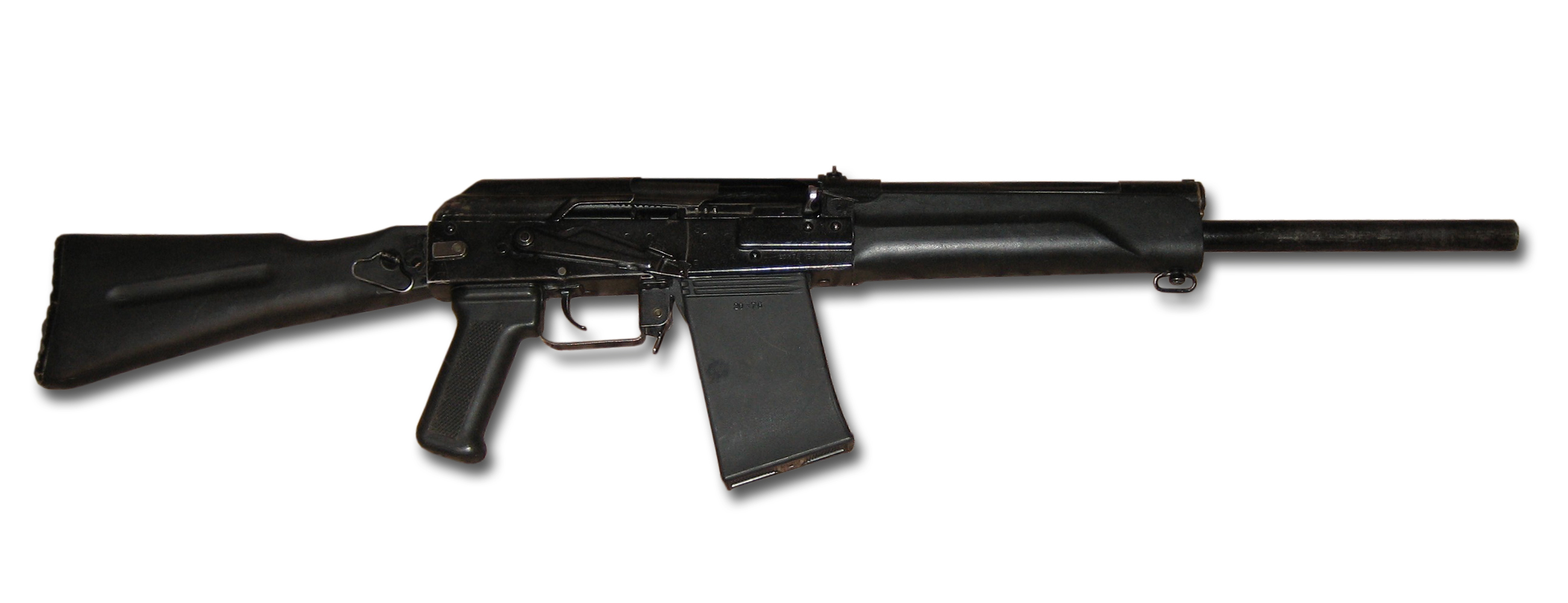 Rifle Saiga20K